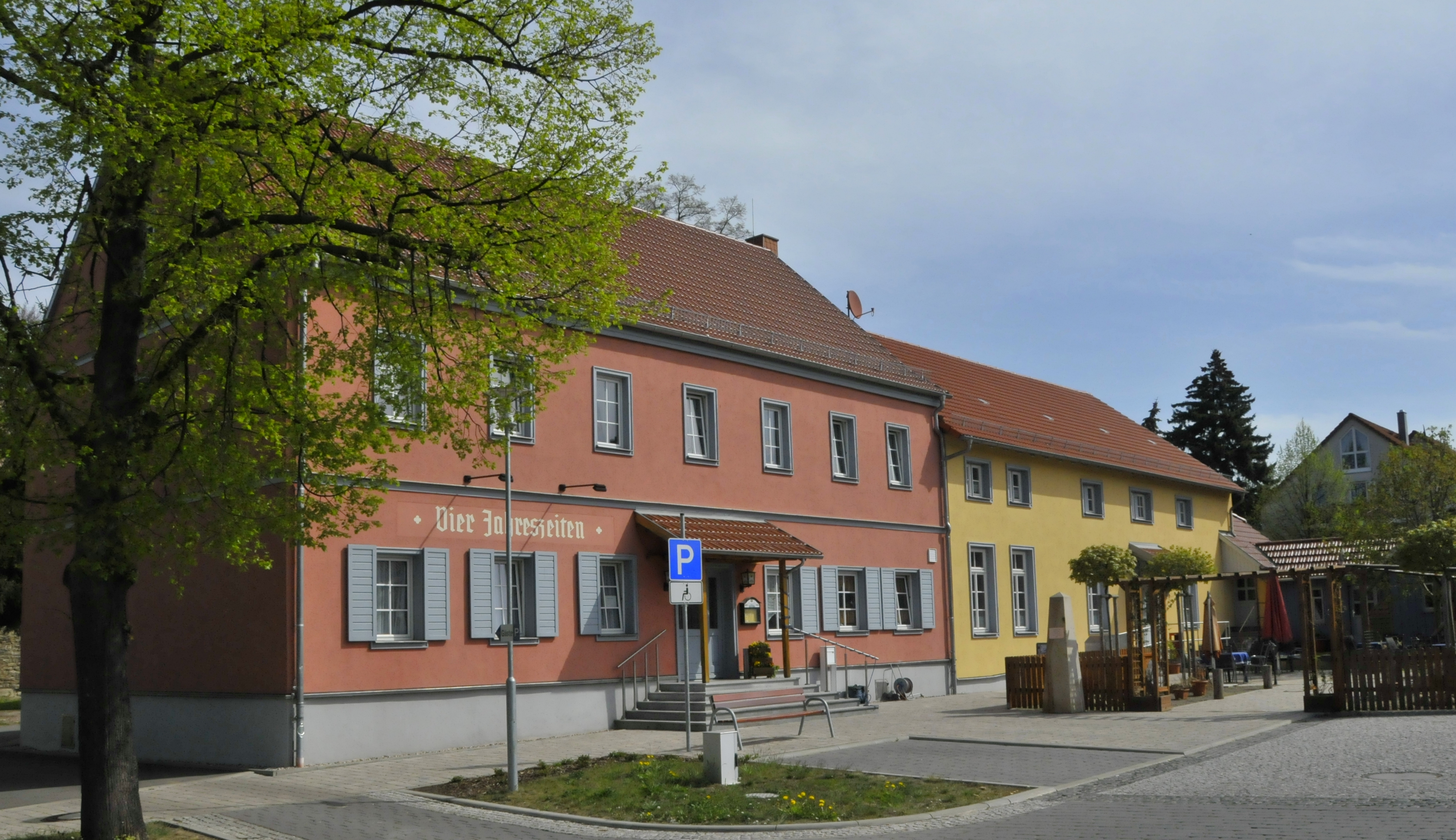 Warza, Gaststätte Vier Jahreszeiten